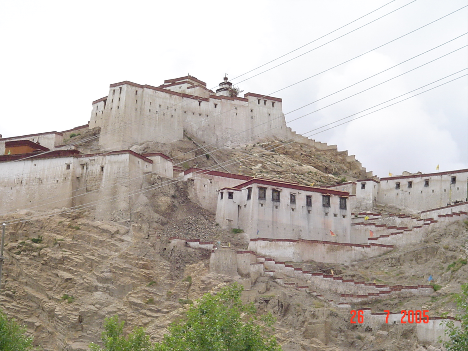 Крепость ГьянтсеКрепость Гьянтсе в Тибете